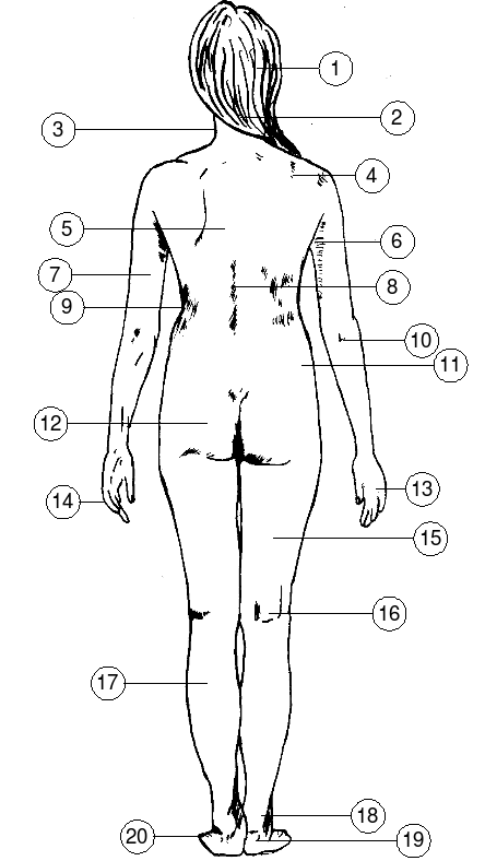 Frau von hinten